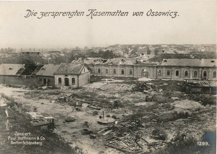 Die zersprengten Kasematten von Ossowicz, 1915.